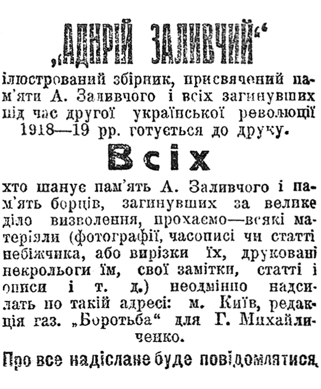 Замітка в газеті про підготовку до друку книги «Андрій Заливчий»